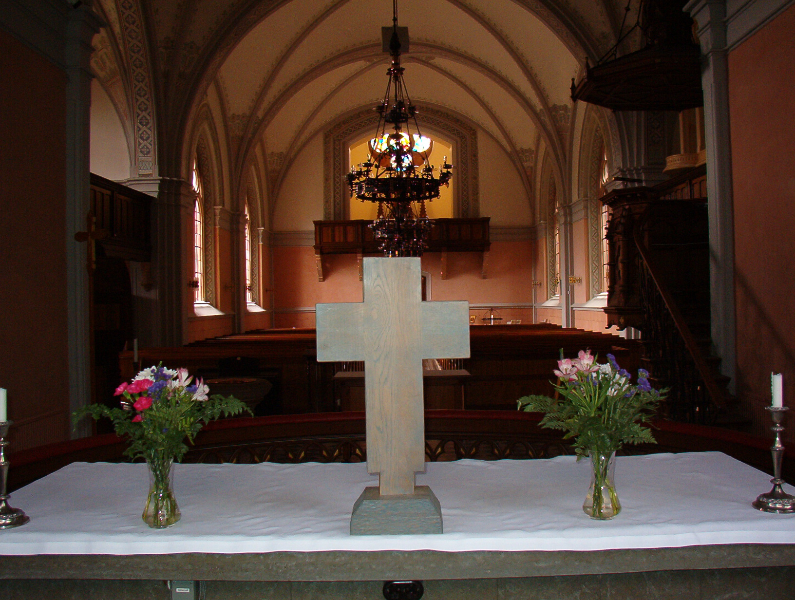 date Aug. 2005